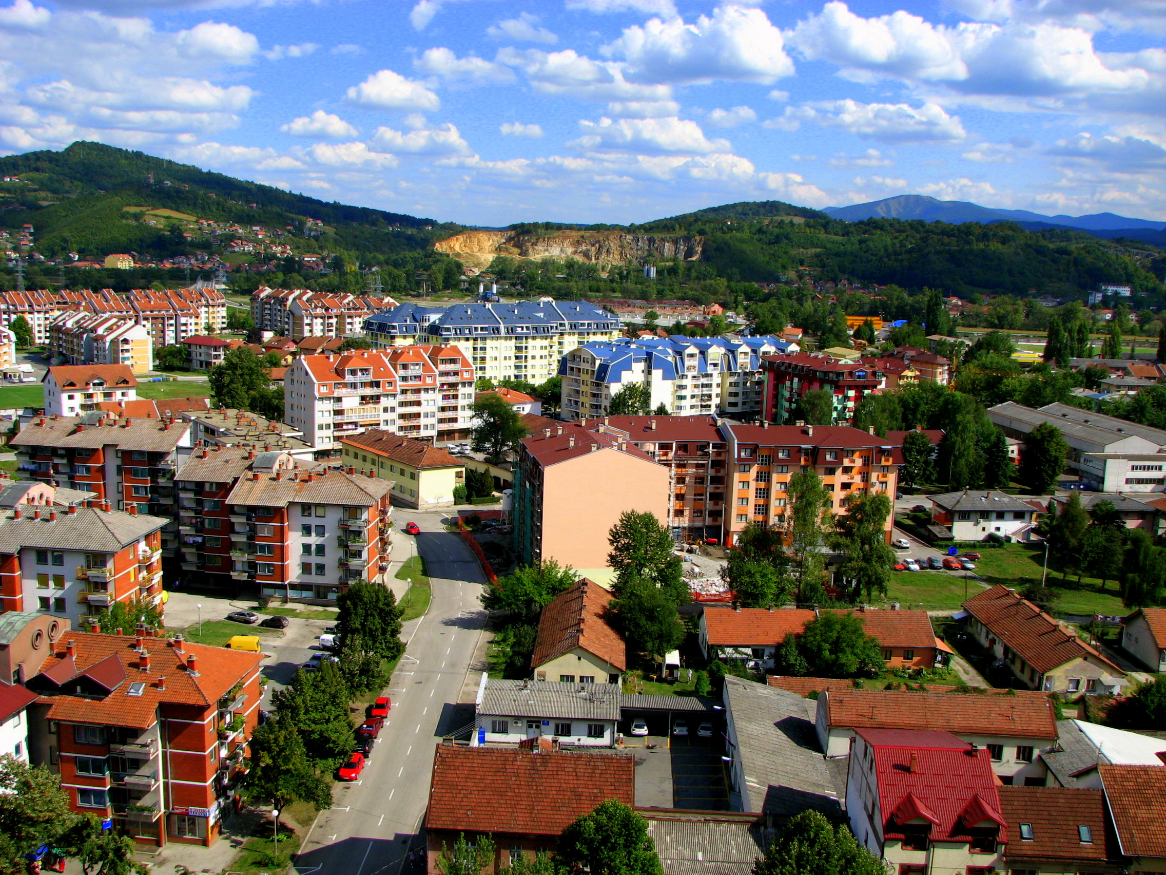 Поглед са Градине на Добој Аутор: Бранко Д. Тодоровић